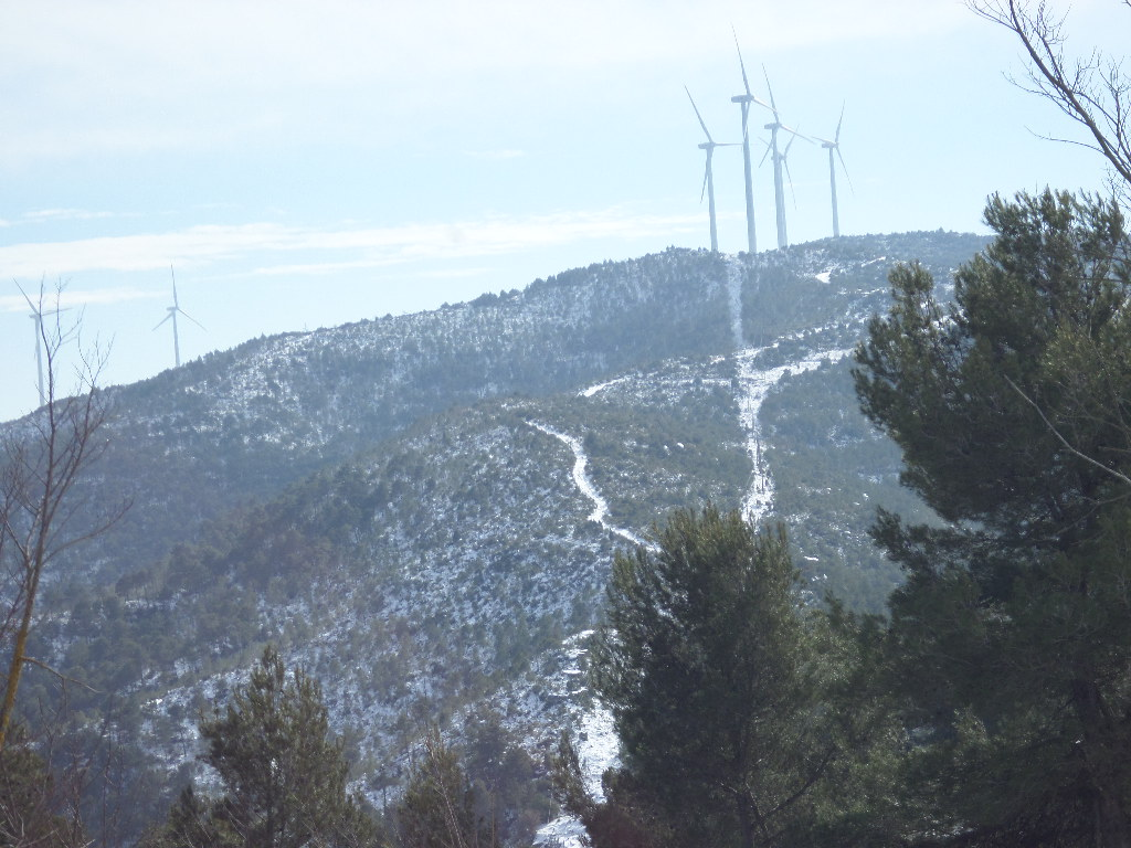 Muntanyes del nord del la Serra de Rubió fetes des de l'església de Sant Martí de Maçana